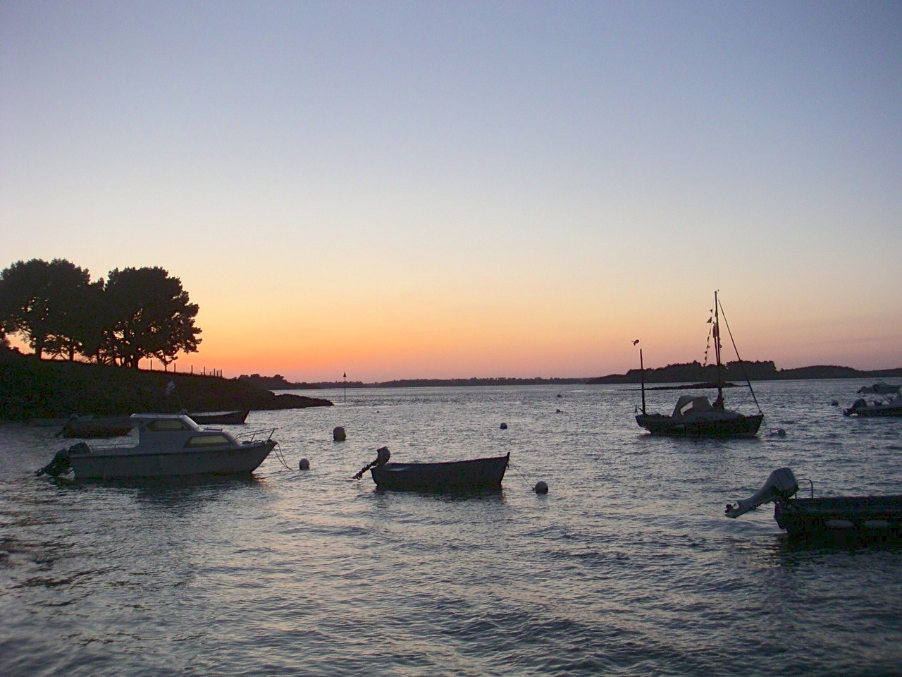 Port du logeo, coucher de soleil